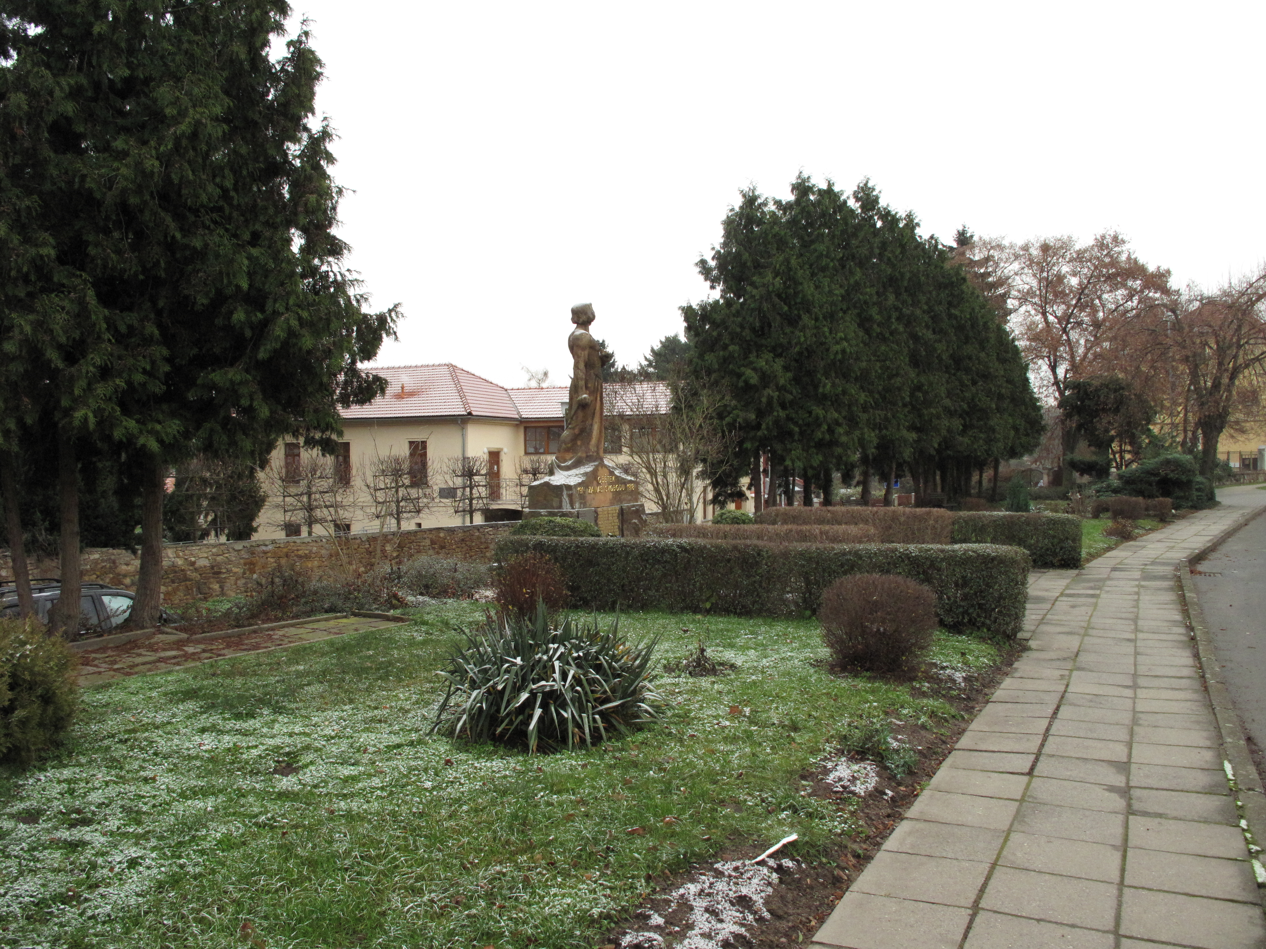 Místo, kde rostla tzv. Karlova Líska v Lázních Toušeň. Okres Praha-východ, Česká republika.